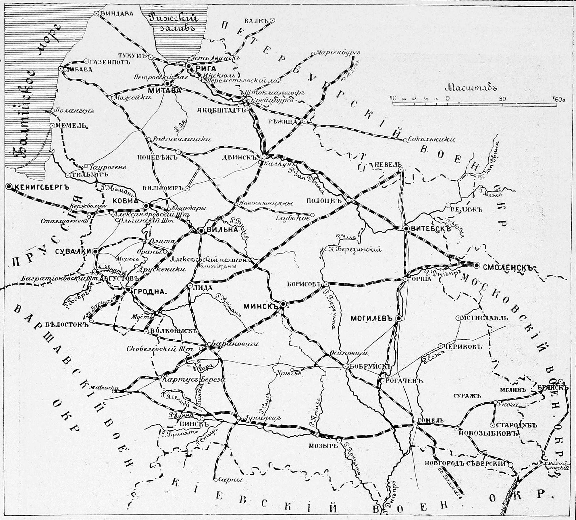 Данное изображение было использовано в статье «Виленский военный округ» опубликованной в шестом томе «Военной энциклопедии», который был издан книгоиздательским товариществом Ивана Дмитриевича Сытина в 1912 году в столице Российской империи городе Санкт-Петербурге.